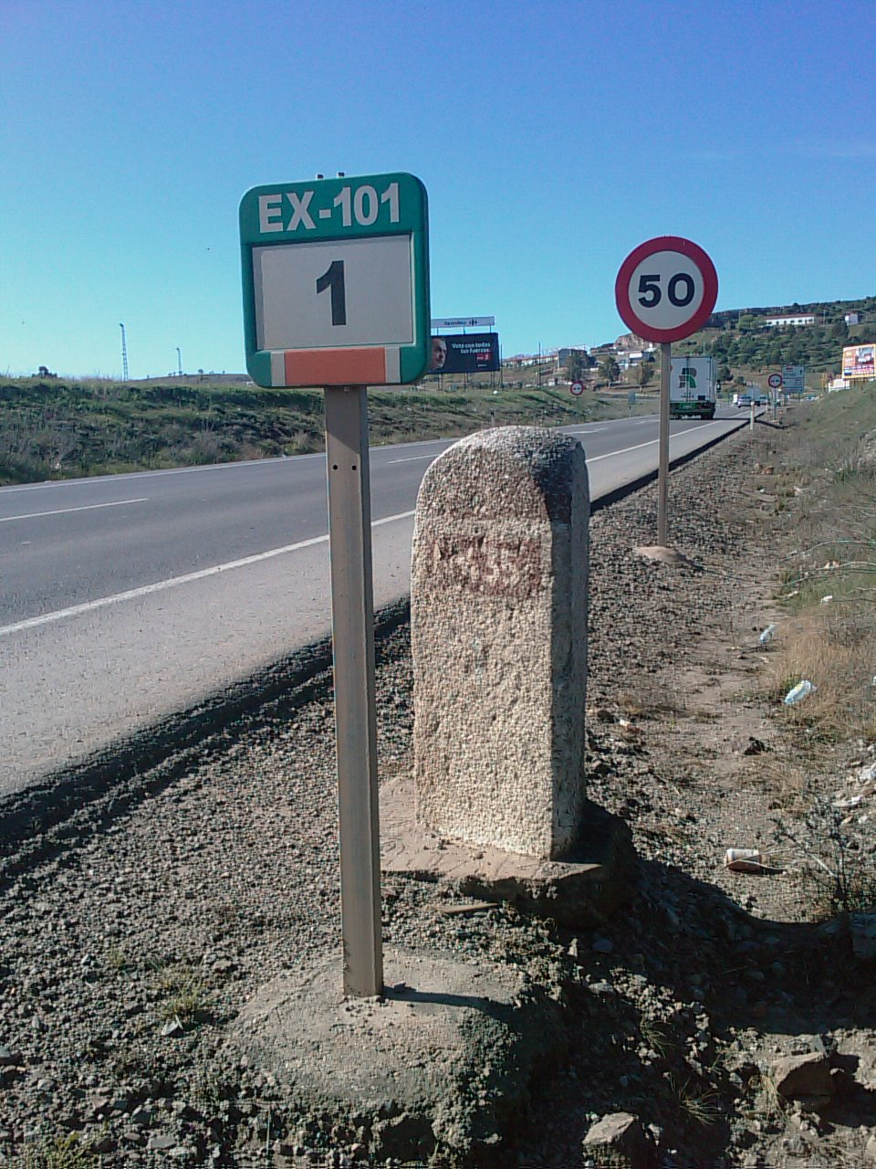 Hito de granito antiguo de la N-435, actualmente descatalogada, e hito moderno de la EX-101, nueva denominación, cerca de Los Santos de Maimona, Badajoz.